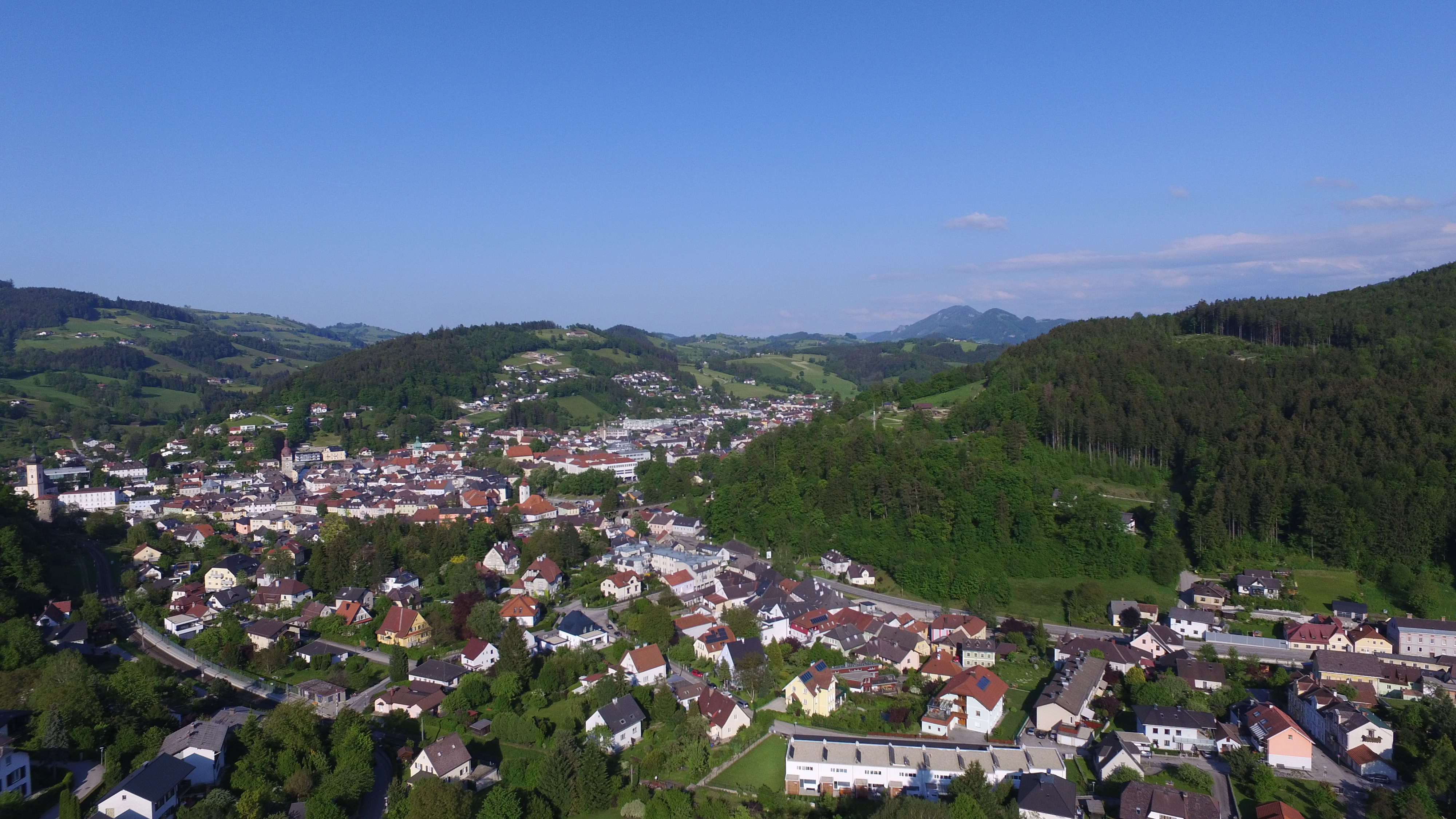 Westansicht der Stadt Waidhofen an der Ybbs (Drohnenaufnahme).